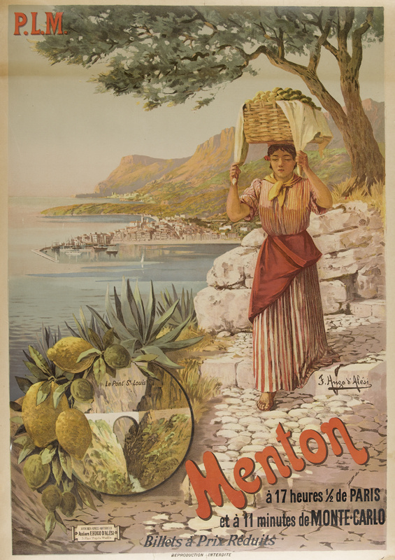 "Menton". Farblithografie, 106 x 75 cm